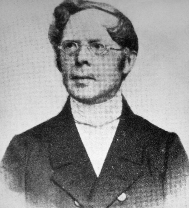 August Dietrich Rische (* 1819 in Minden, † 1906 Ludwigslust), Pfarrer in Gütersloh, Schwiegersohn und Biograf von Johann Heinrich Volkening